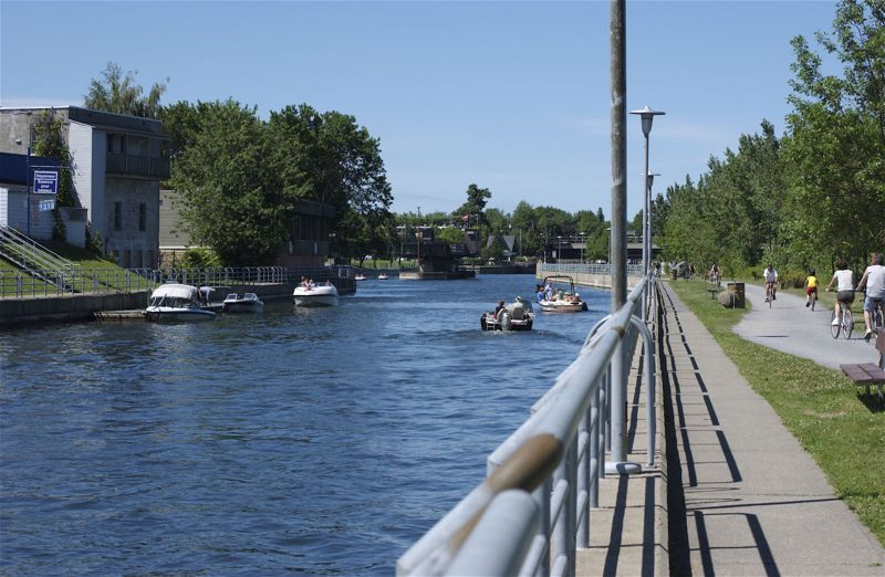 Canal de Chambly et piste polyvalente, Saint-Jean-sur-Richelieu.